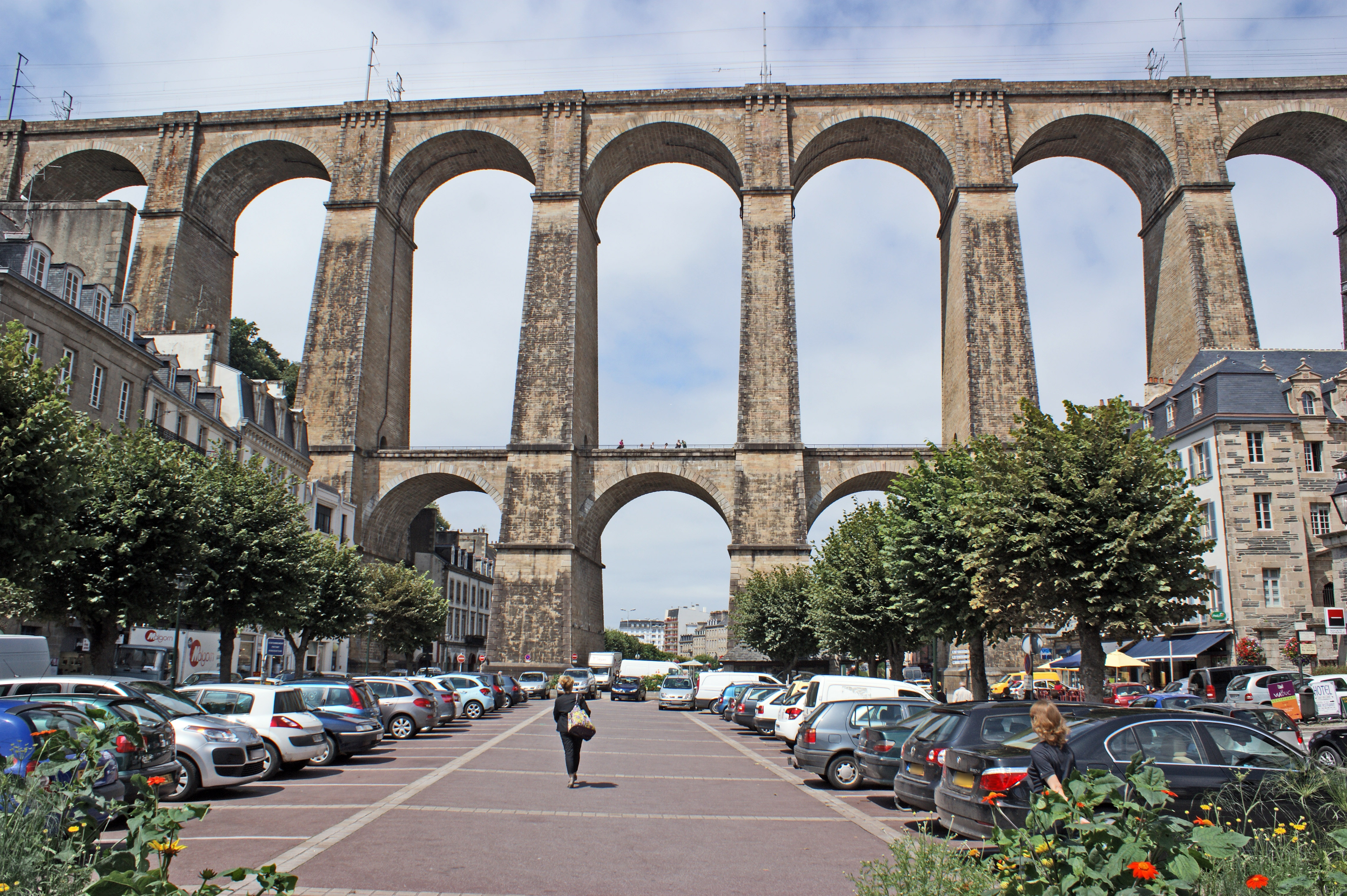 Le viaduc de Morlaix vu de la place du centre ville.